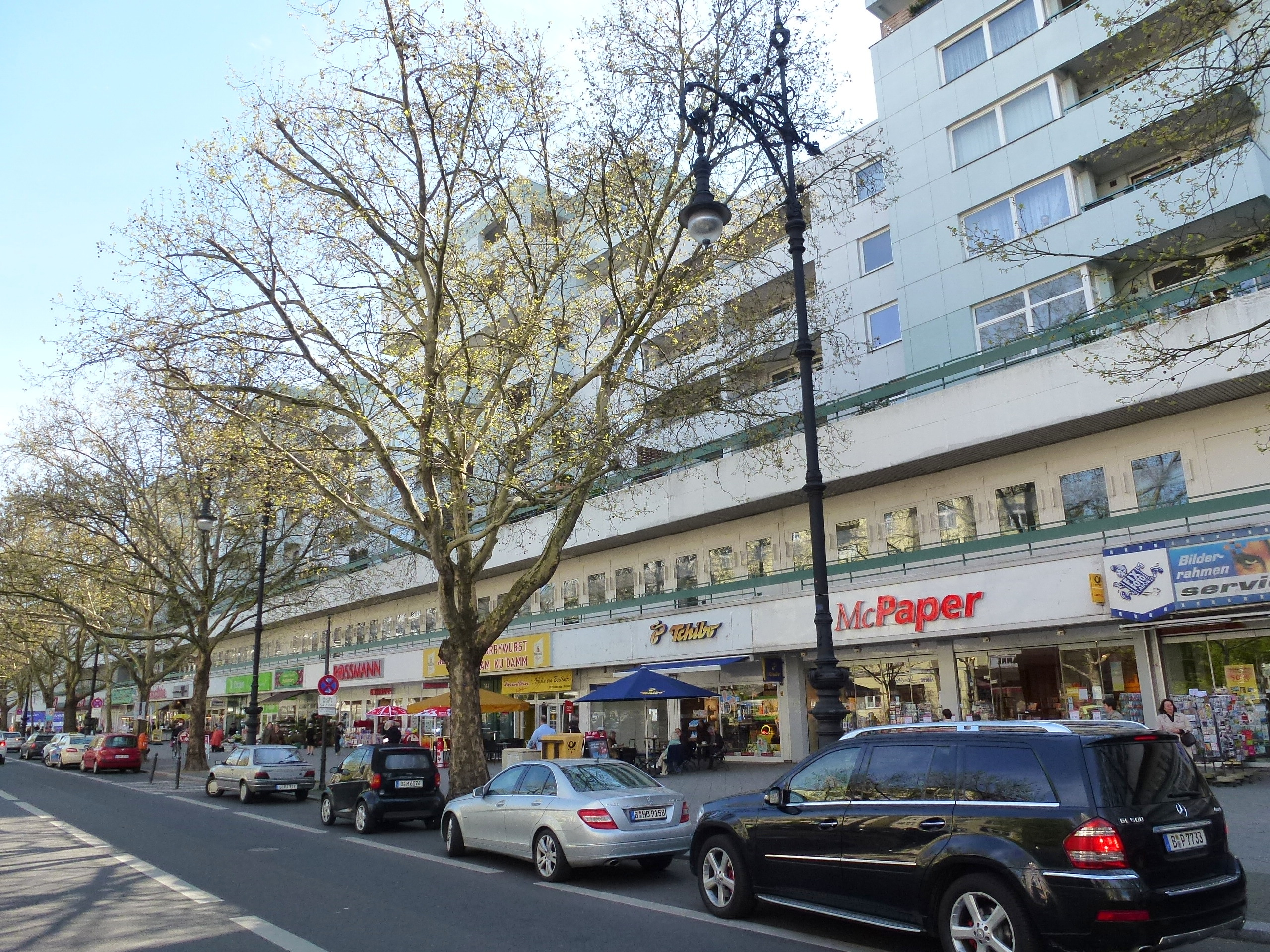 Berlin-Halensee Kurfürstendamm 143